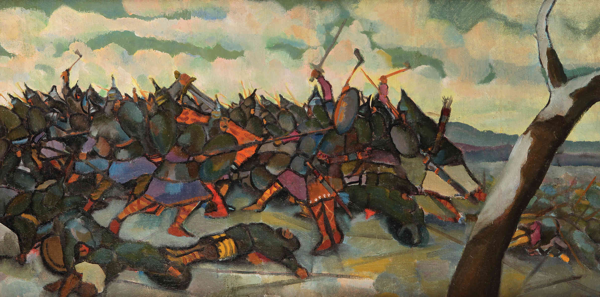 Бітва на Нямізе. Палатно, алей. 71×142,7 см. Нацыянальны мастацкі музей Рэспублікі Беларусь